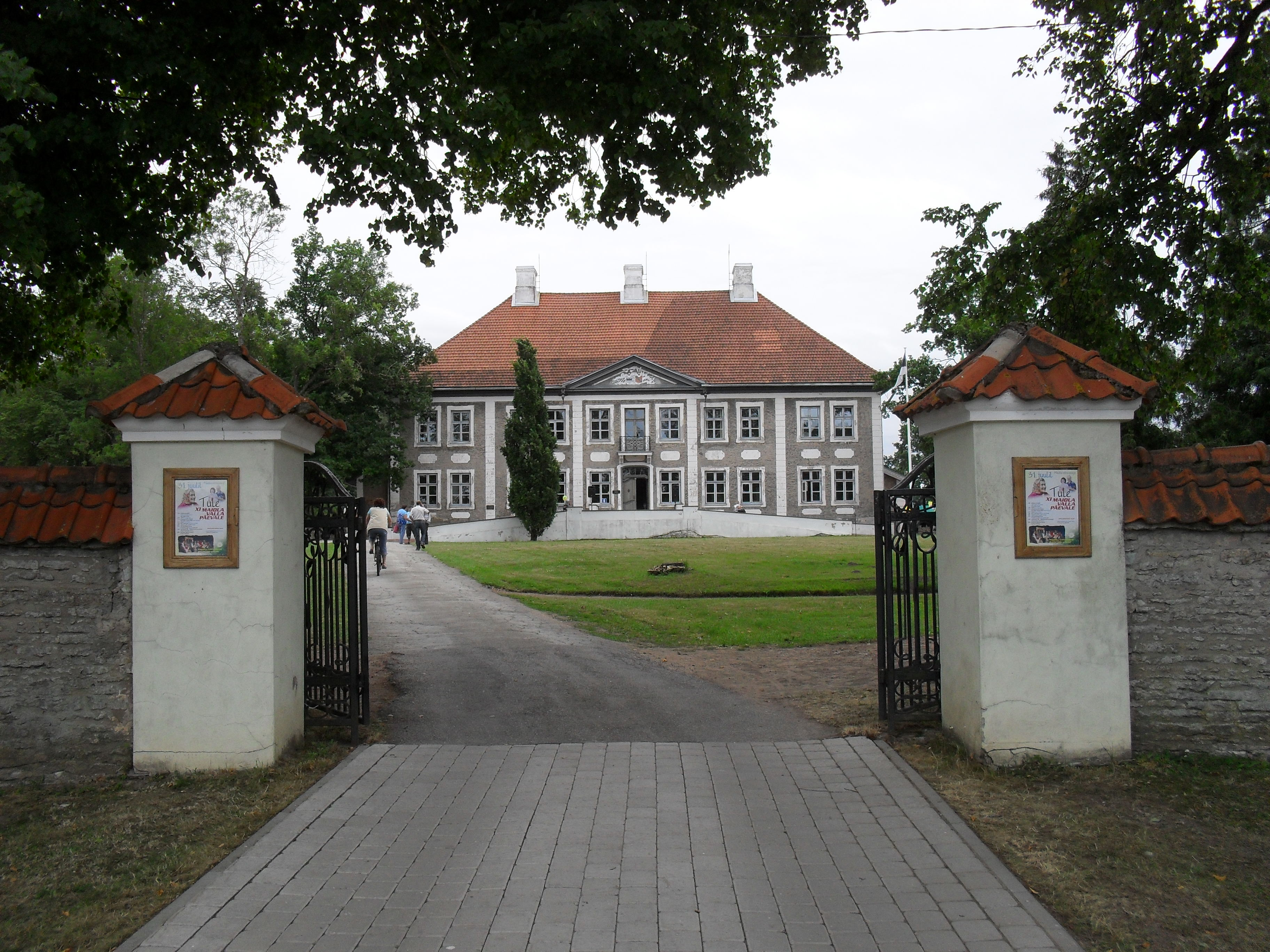 Maidla mõisa piirdemüür, 18. sajand